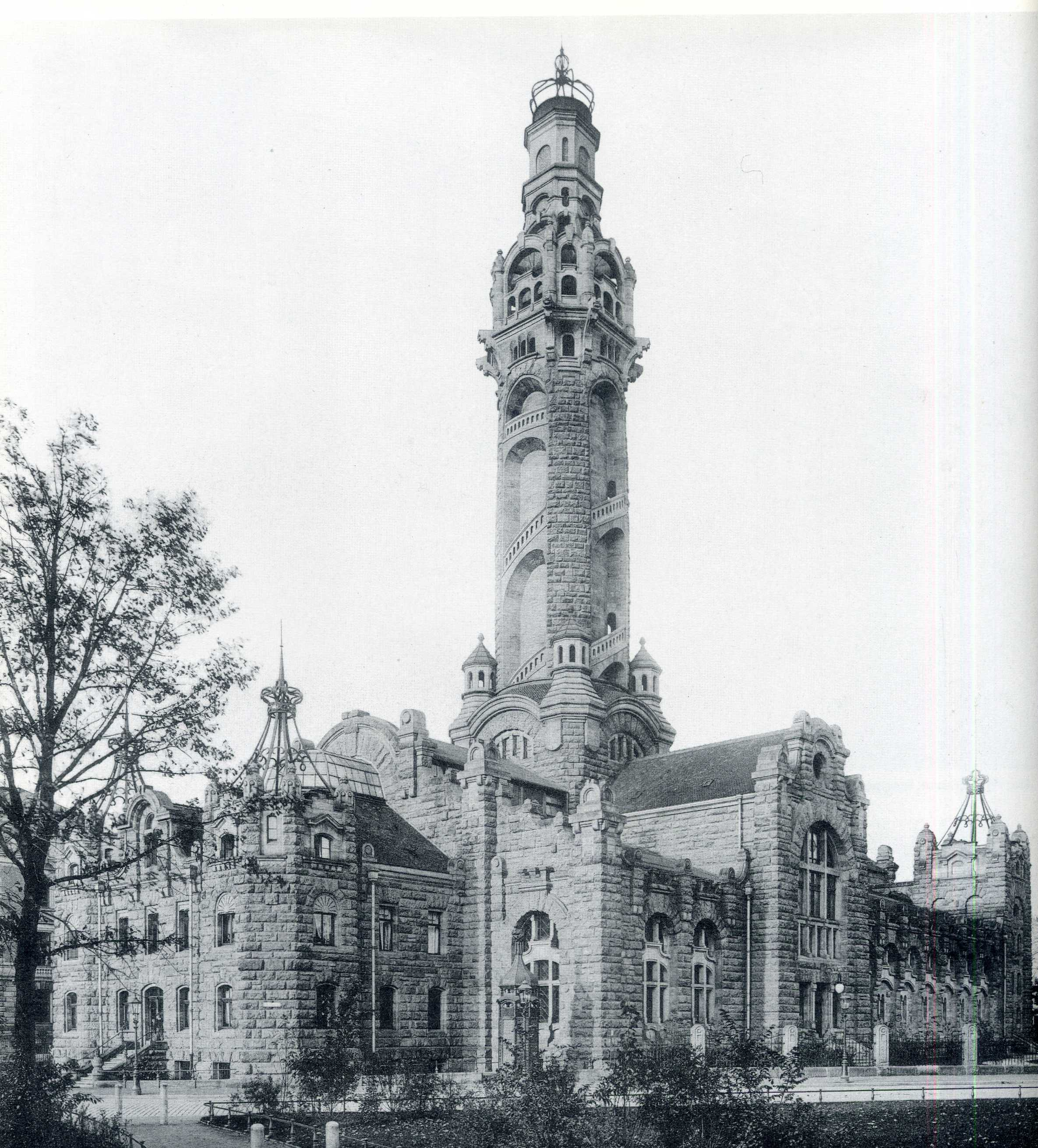 Dresden, Staatliches Fernheiz- und Elektrizitätswerk, erbaut 1899-1900 nach Entwurf der Architekten Lossow und Viehweger, Turm um 1935 abgetragen, 1945 zerstört